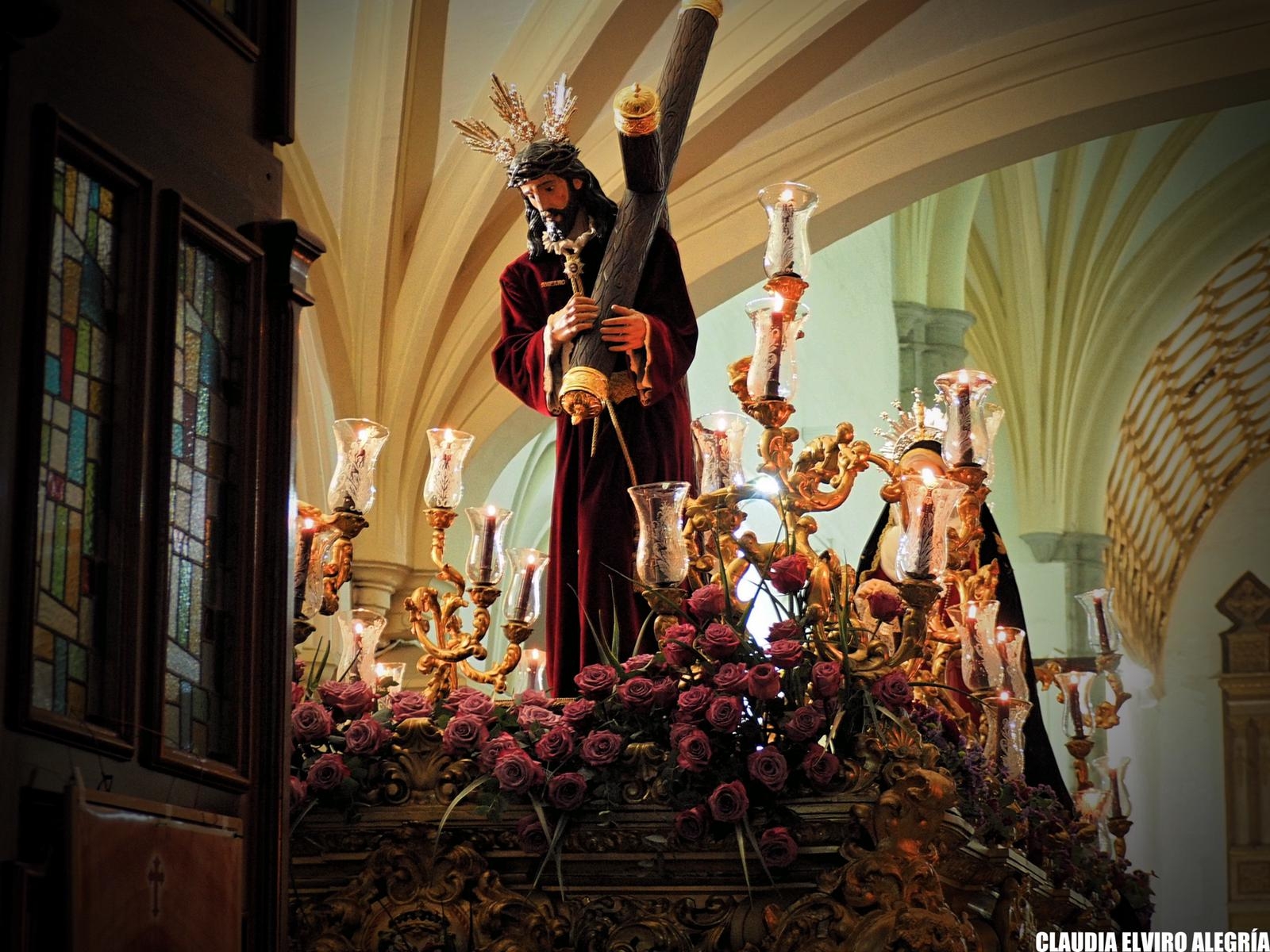 Nuestro Padre Jesús del Amparo Miércoles Santo 2019. Badajoz.